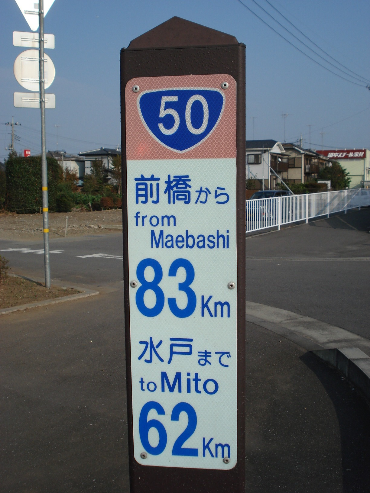 一般国道50号 83キロポスト（前橋起点） 茨城県結城市結城 起点の前橋からの距離と終点の水戸までの距離が併記されている。 裏面には所在地名が橙地に青字で表示。